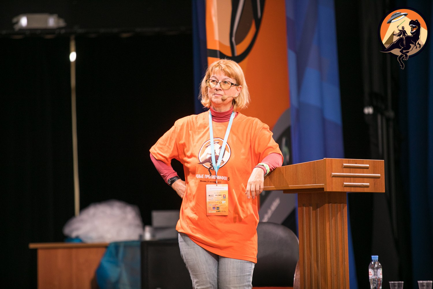 Марина Бутовская на форуме «Учёные против мифов-5» 21 октября, Москва, НИТУ «МИСиС»